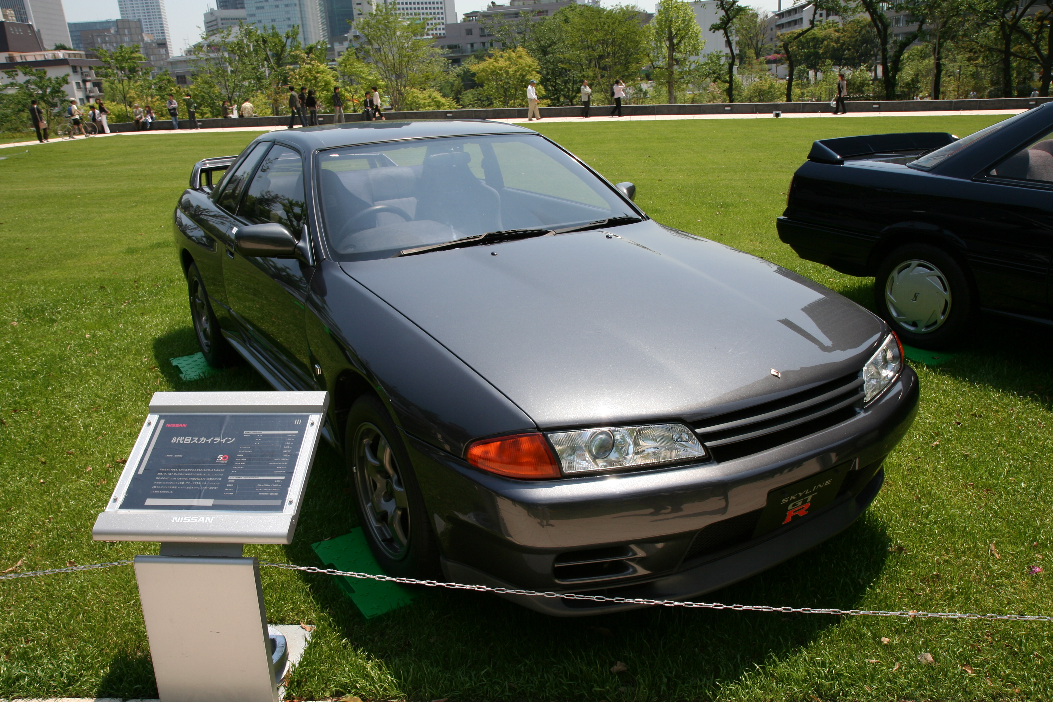 日産・スカイラインGTR 8代目(R32系)。